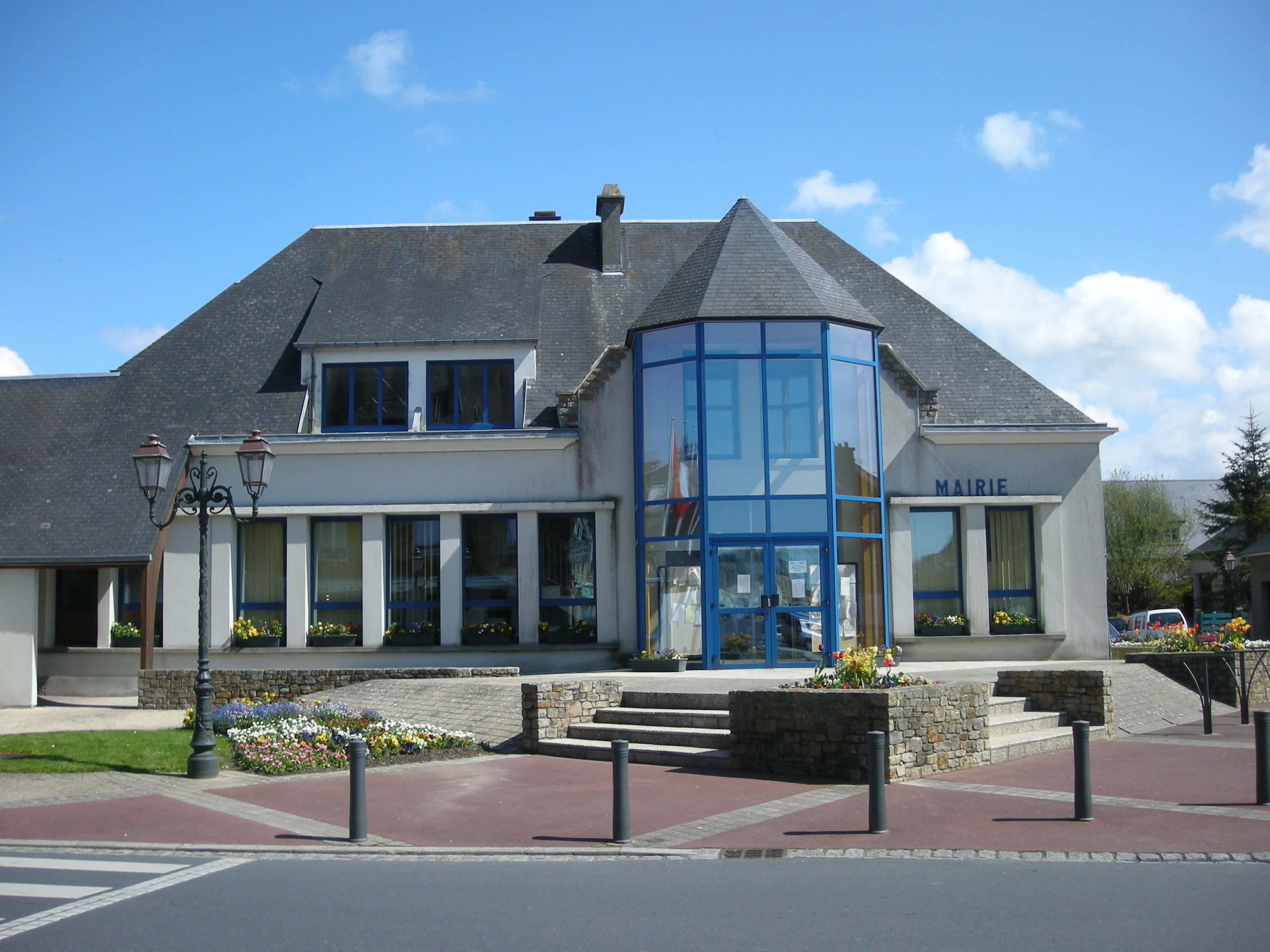 Hôtel de ville de Lessay (département de la Manche)